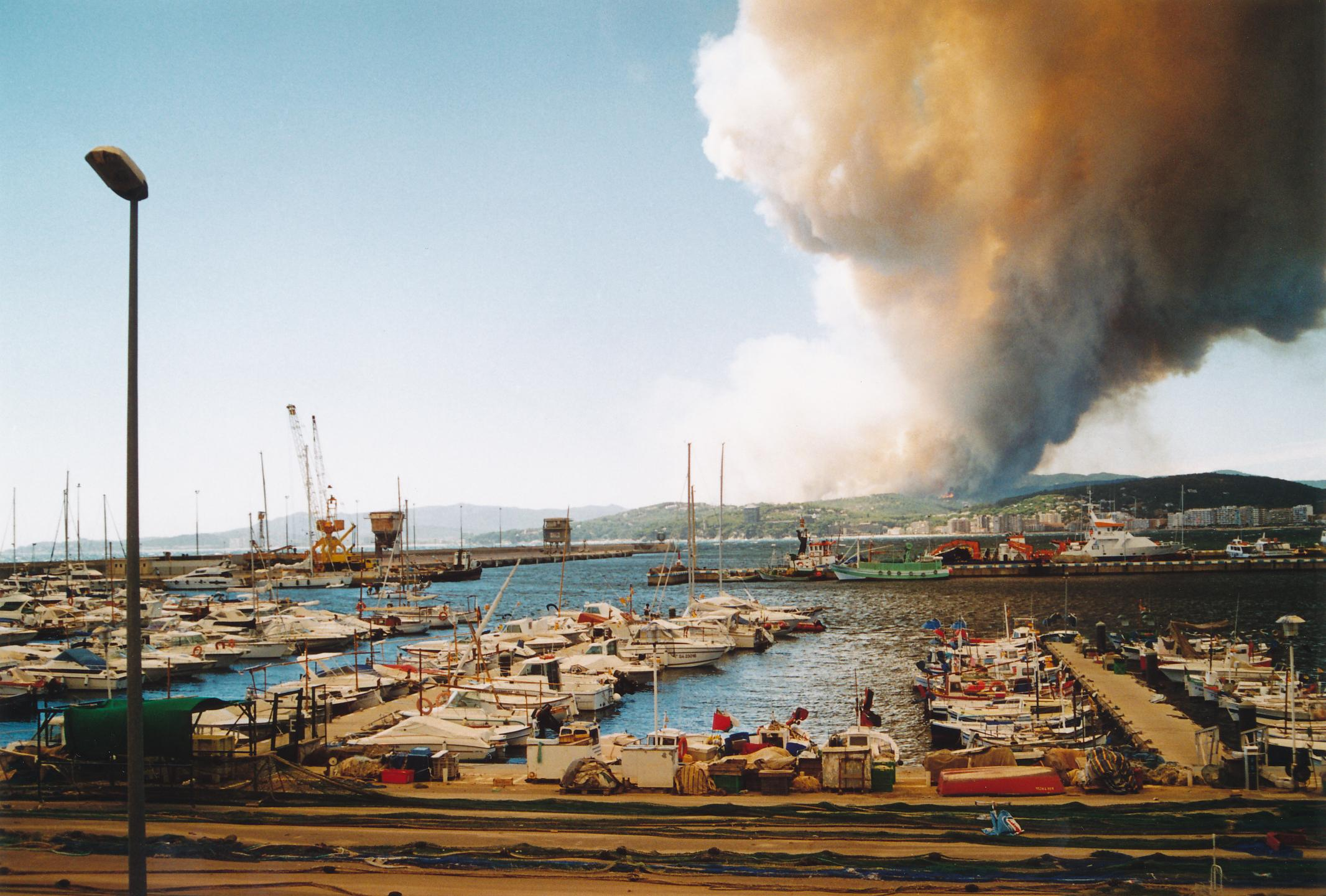 Waldbrand bei Platja d’Aro (Aufgenommen in Palamós/Katalonien/Spanien) Datum: 08/2003 Urheber: Michael Pfeiffer privates Fotoalbum des Urhebers